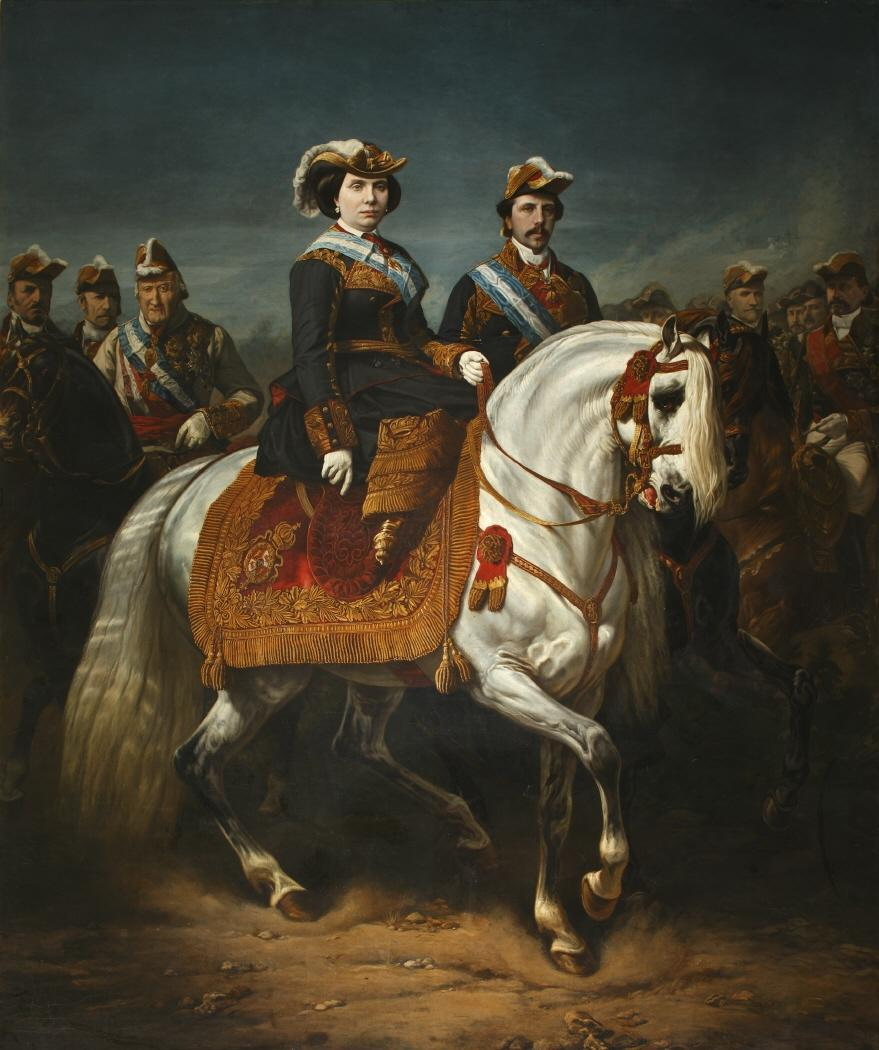 Retrato ecuestre de la reina Isabel II de España (1830-1904), que aparece acompañada por su esposo, el rey consorte Francisco de Asís de Borbón.